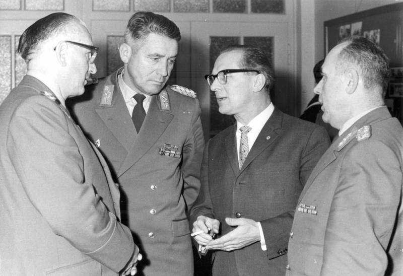 SED-Delegiertenkonferenz der NVA, Honecker SED-Delegiertenkonferenz der NVA, v.l.n.r.: Generalmajor [Walter] Allenstein, Armeegeneral Heinz Hoffmann, Erich Honecker, Generalleutnant Wagner Abgebildete Personen: Allenstein, Walter: Stellvertretender Minister für Nationale Verteidigung, DDR Hoffmann, Heinz: Minister für Nationale Verteidigung, Mitglied des ZK der SED, DDR Honecker, Erich: Staatsratsvorsitzender, Generalsekretär des ZK der SED, DDR (PND 118553399)